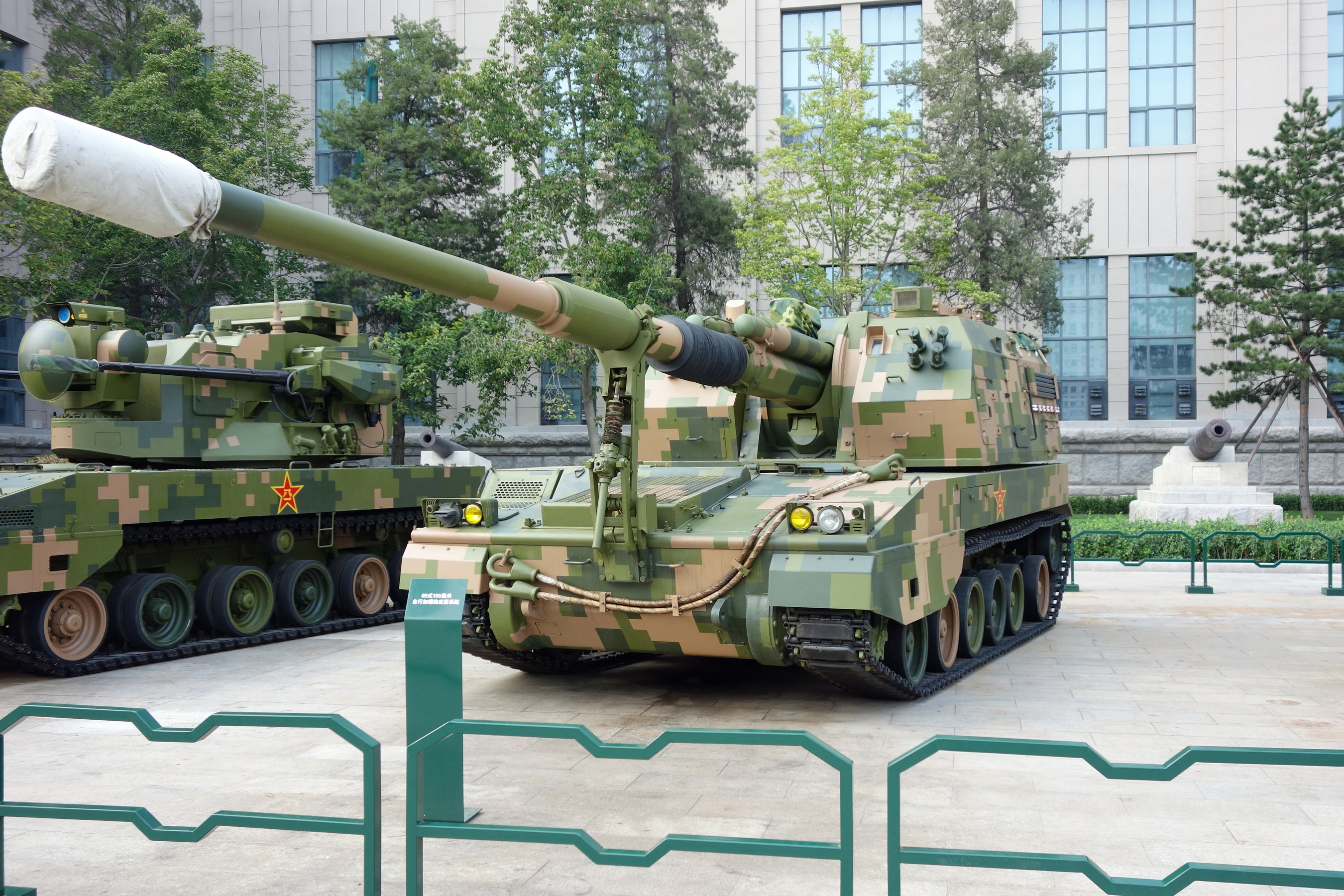 中国人民革命军事博物馆纪念中国人民解放军建军90周年主题展览展出的PLZ-05 155毫米自行加榴炮。